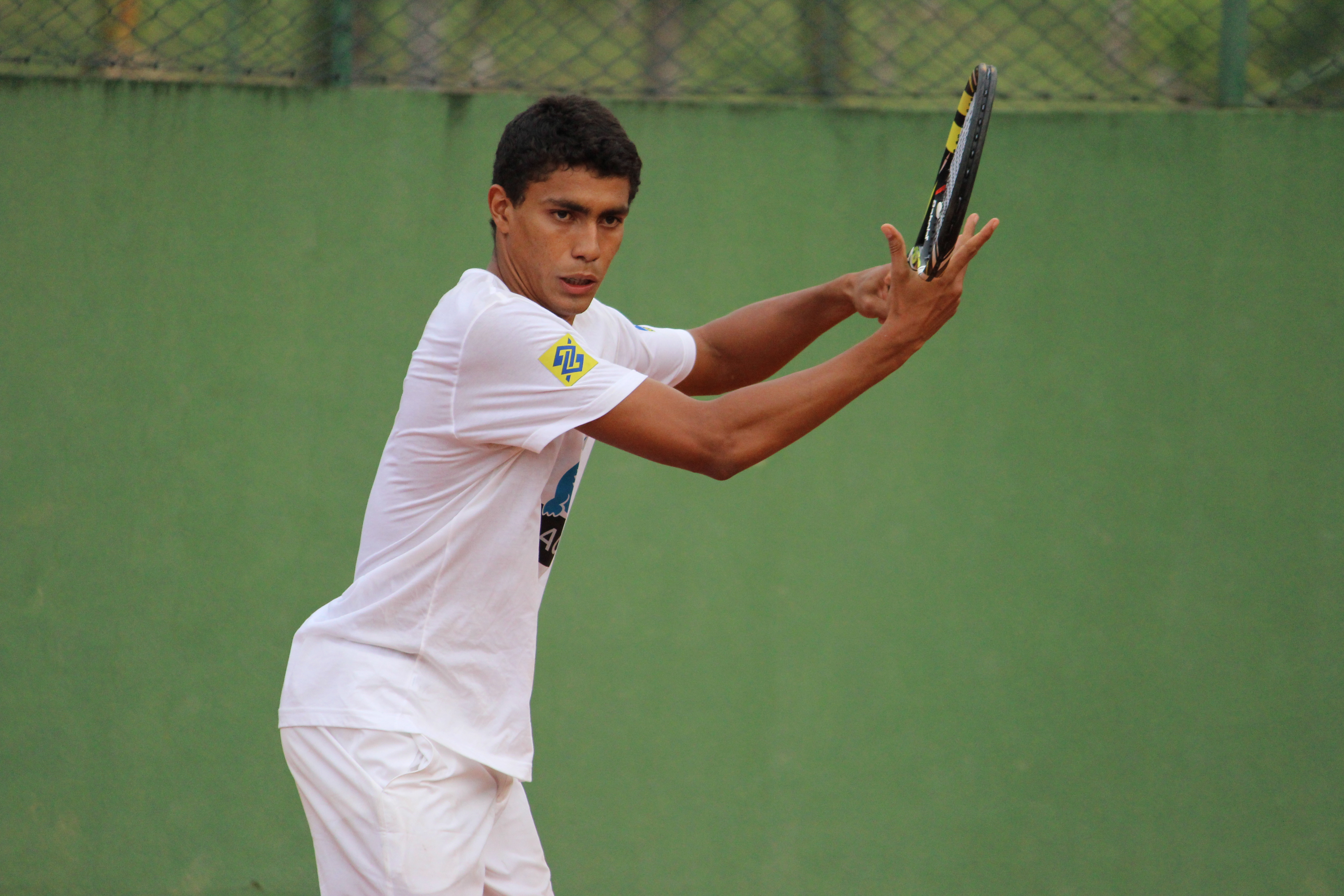 Tenista Thiago Monteiro